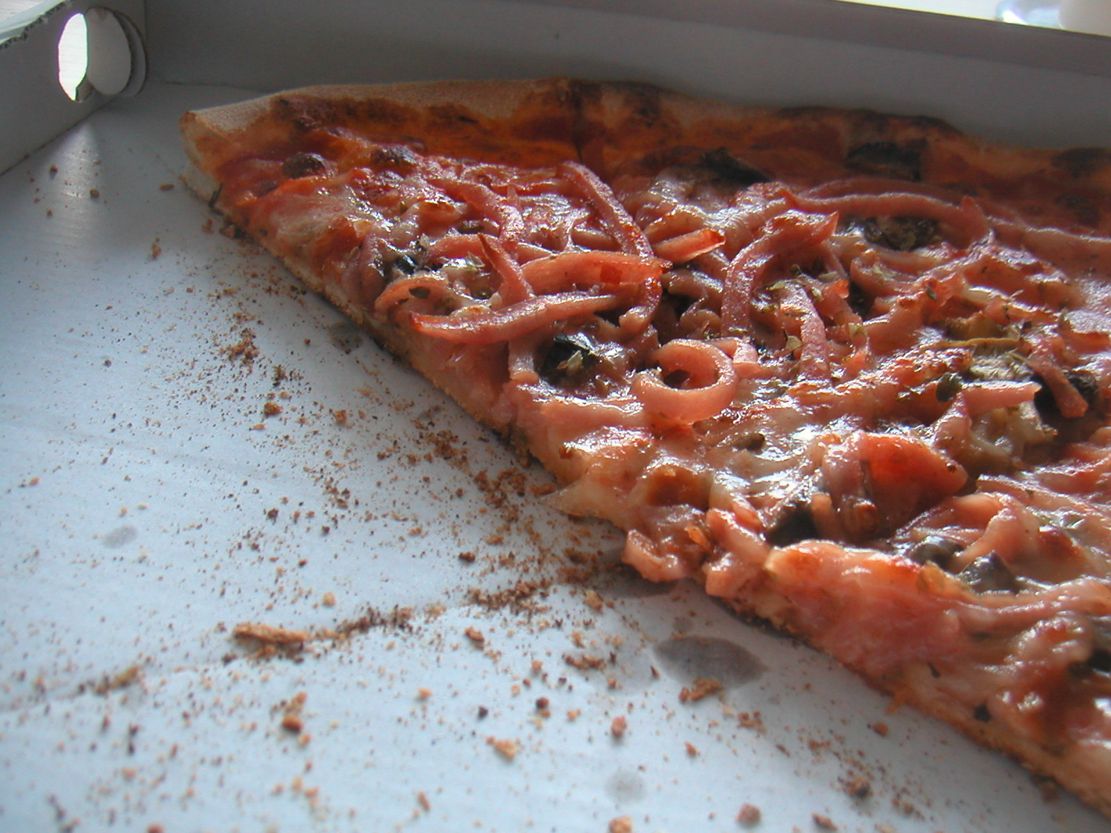 Pizza in a box